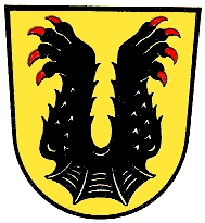 Wappen der Grafschaft Hoya